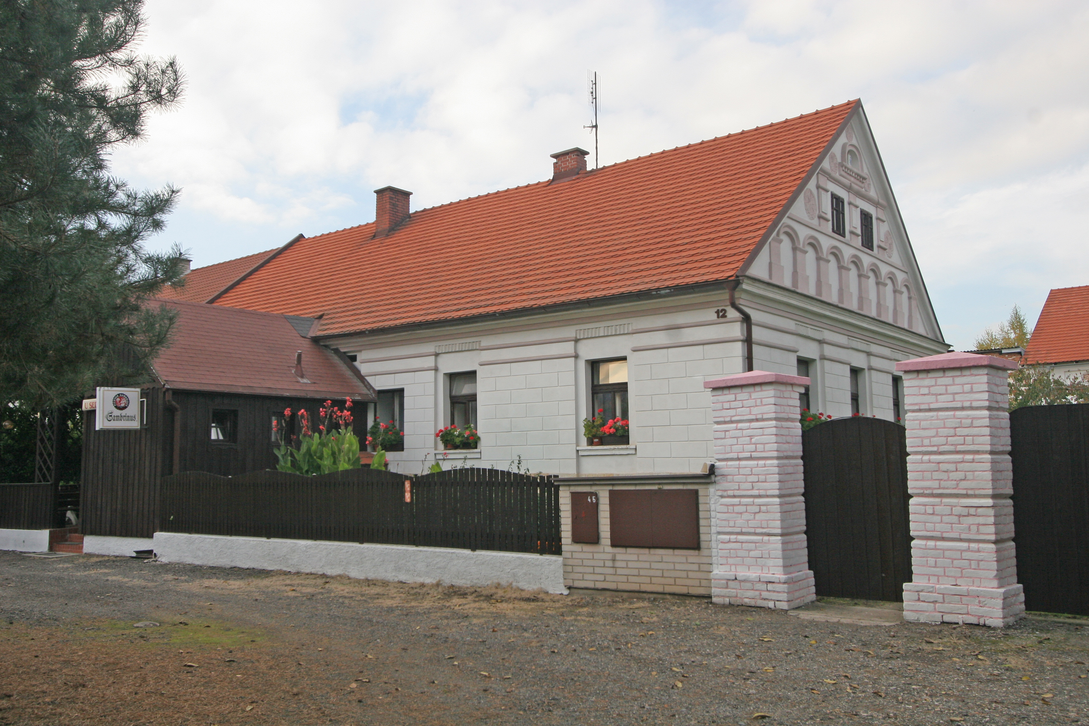 Venkovská usedlost (Roudnice), Roudnice 12